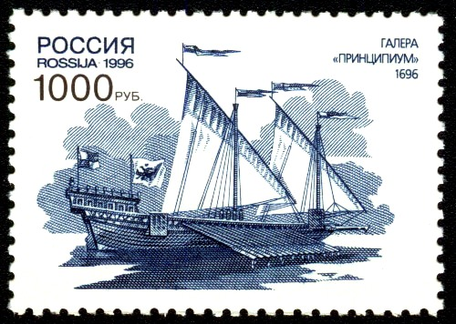 Галера "Принципиум", на которой в 1696 году был принят Указ по галерам - прототип морского устава России